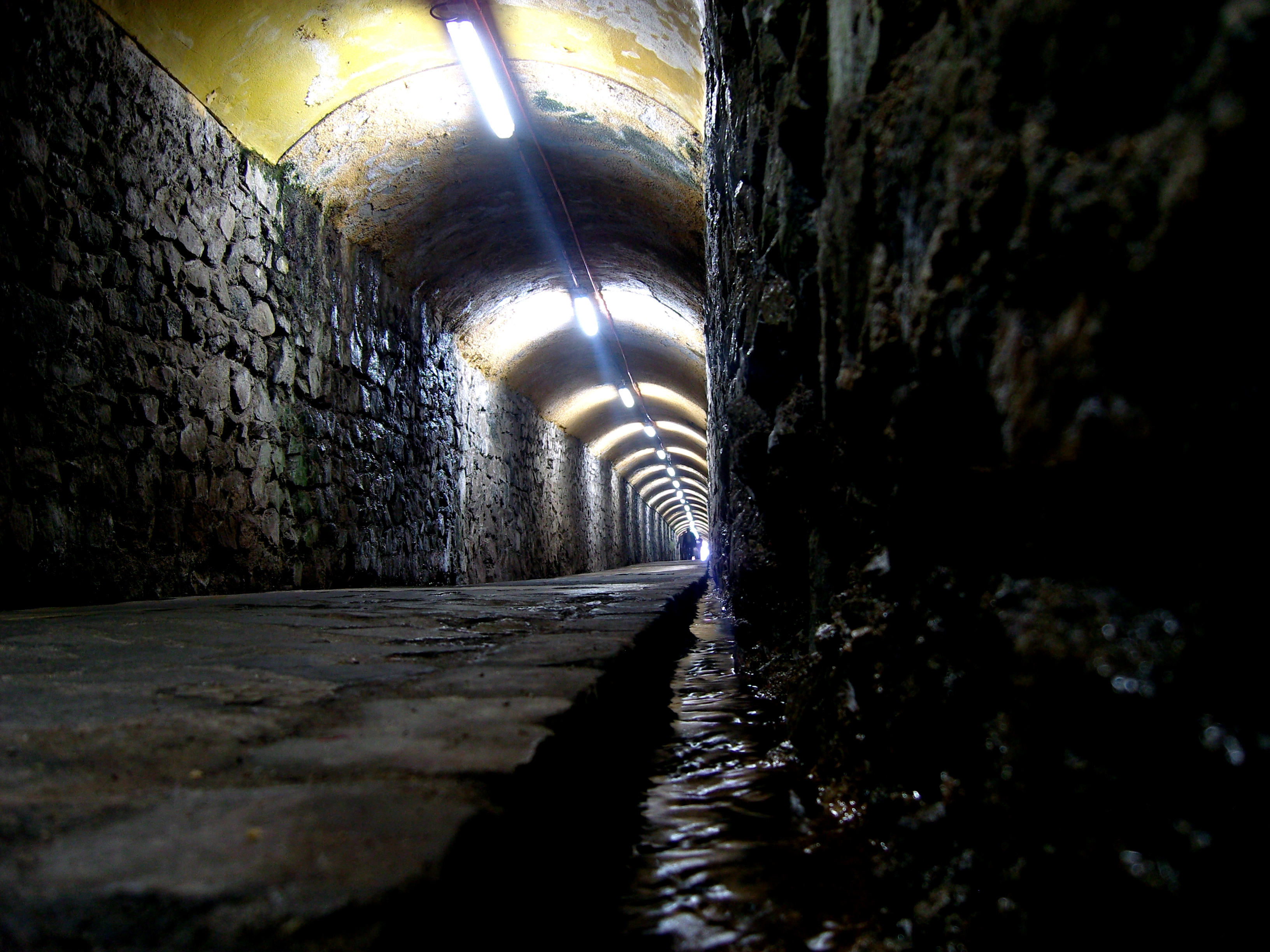 El Ascensor Polanco es uno de los más especiales ascensores de Valparaíso, Chile. En honor a la verdad, es el "único" ascensor de los 15 de la ciudad, pues es el único que se mueve verticalmente, mientras el resto son más bien funiculares, pero son conocidos popularmente como ascensores. This is a photo of a national monument in Chile: 625